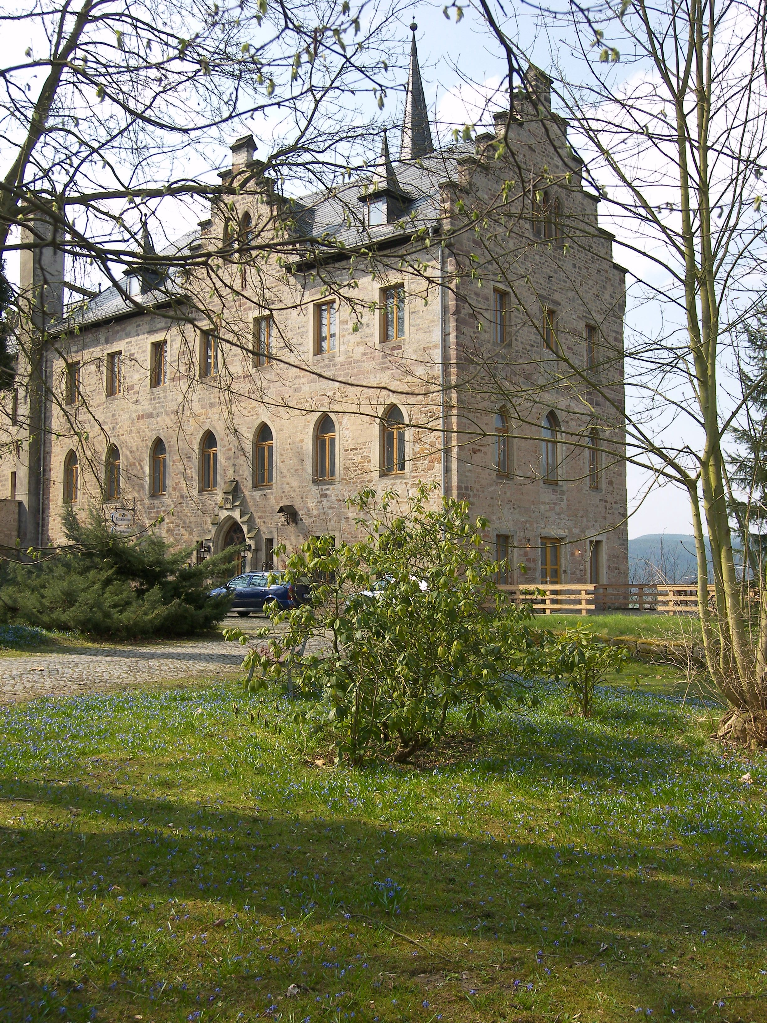 Südostecke der Weißenburg in Uhlstädt-Kirchhasel